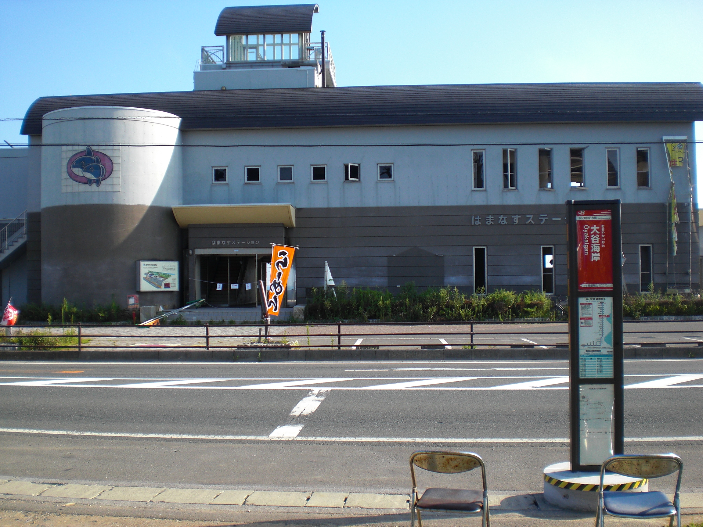 BRTの駅名標と現在の駅舎(津波被害のため立入禁止)